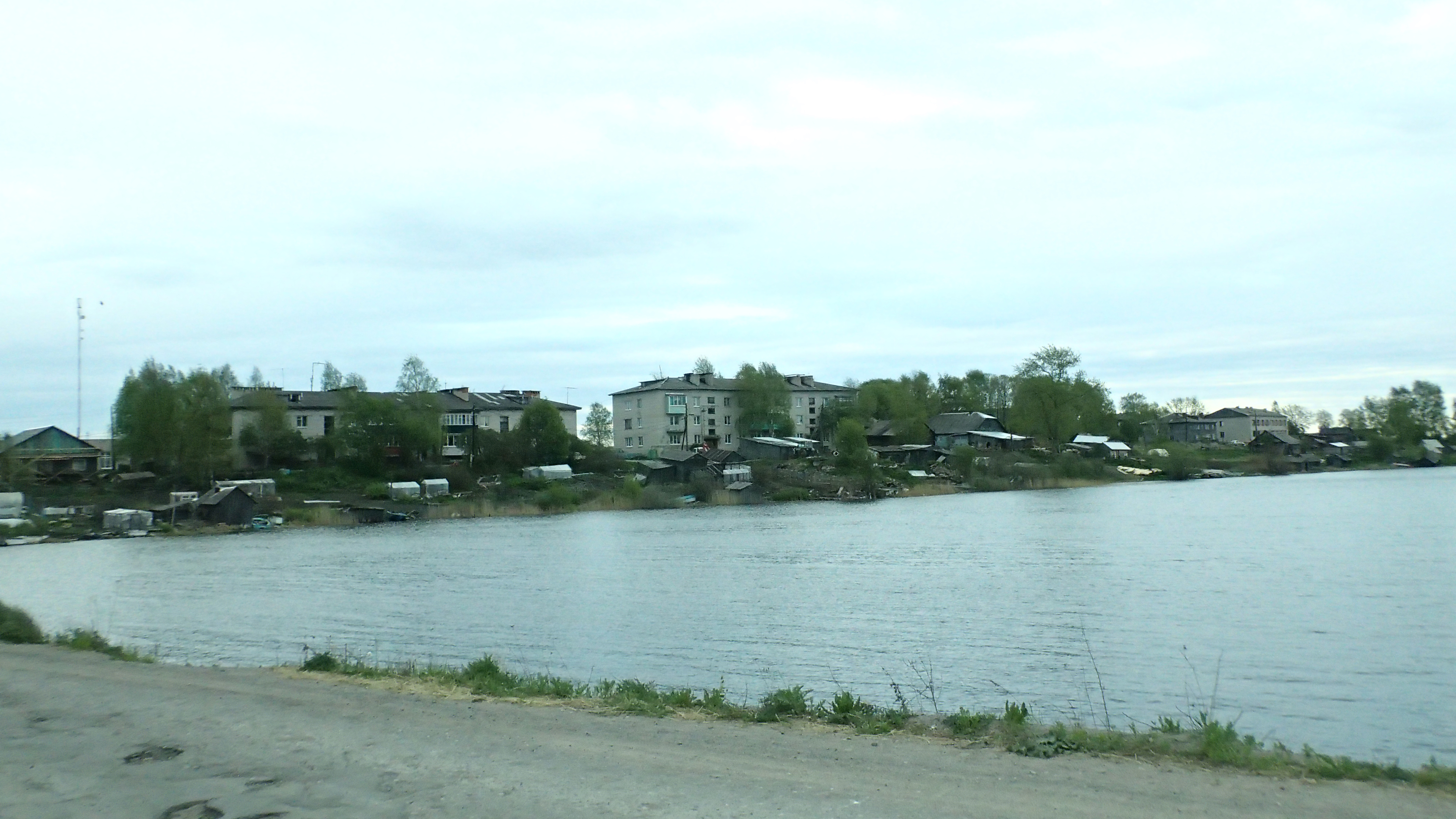 Село Шуньга Республика Карелия. Вид со стороны Путкозера